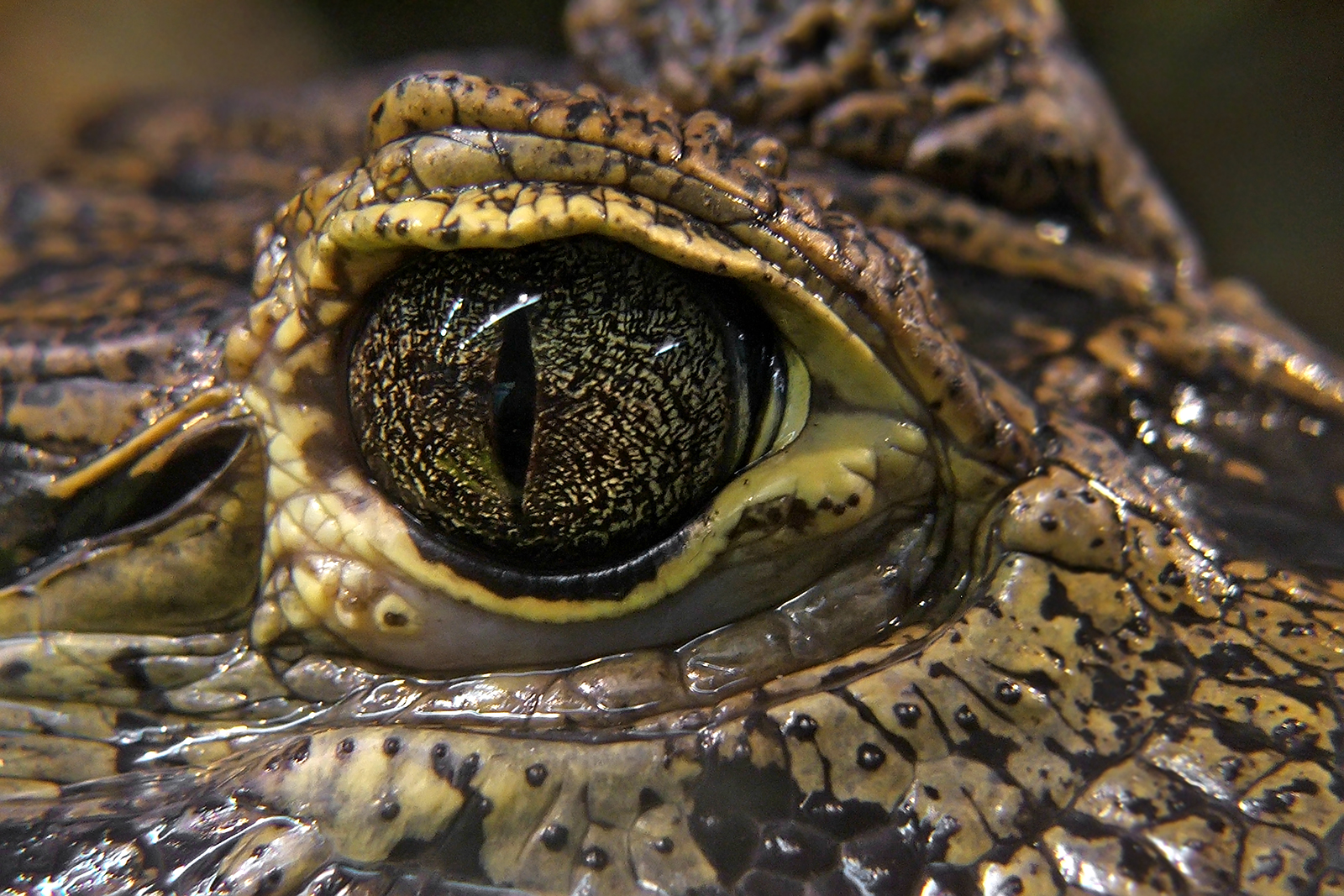 I ae vai encarar?